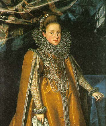 Maria Magdalena von Österreich, Ehefrau Cosimo II. de’ Medici